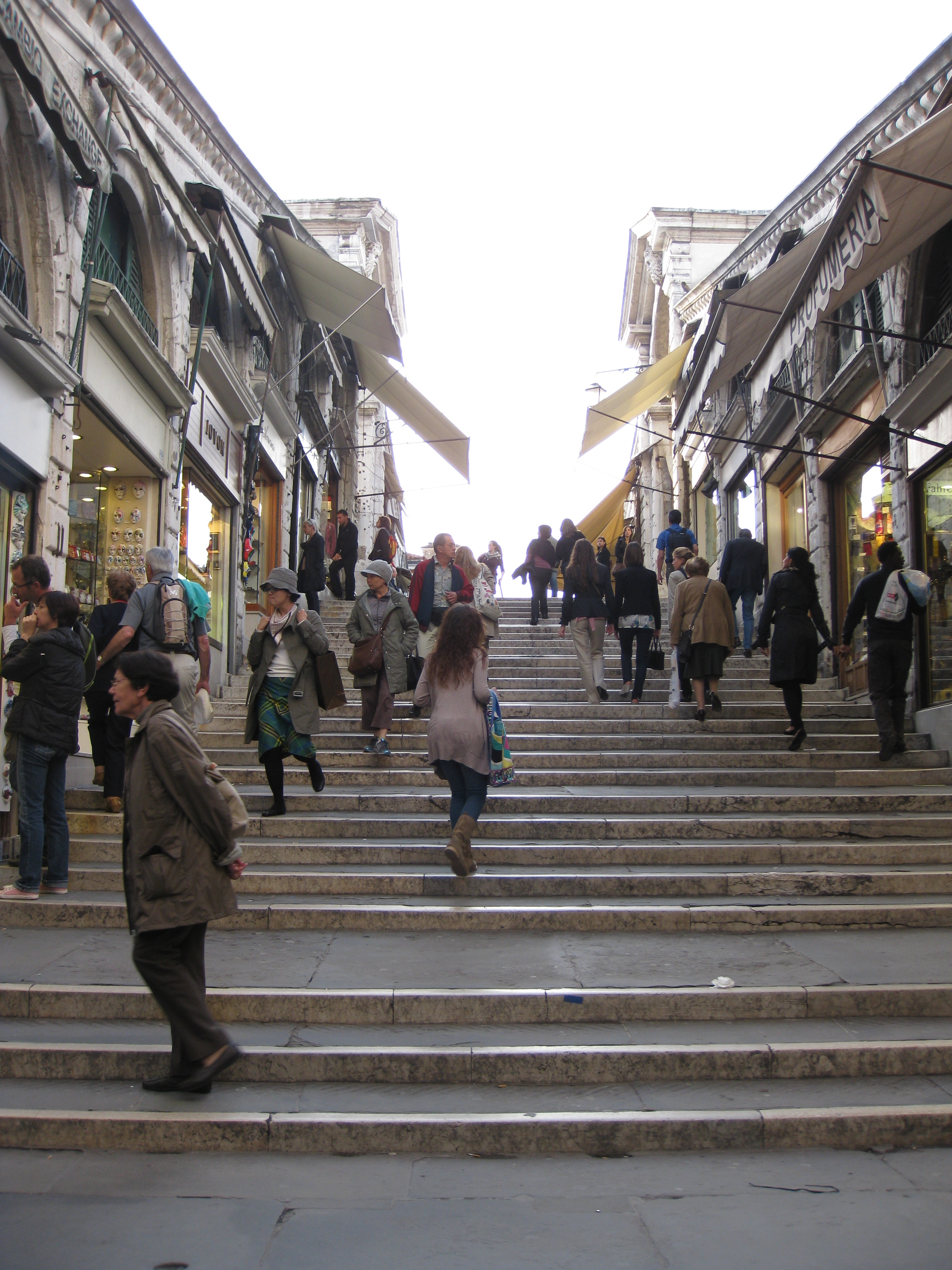 Rialto Shops חנויות על גשר הריאלטו